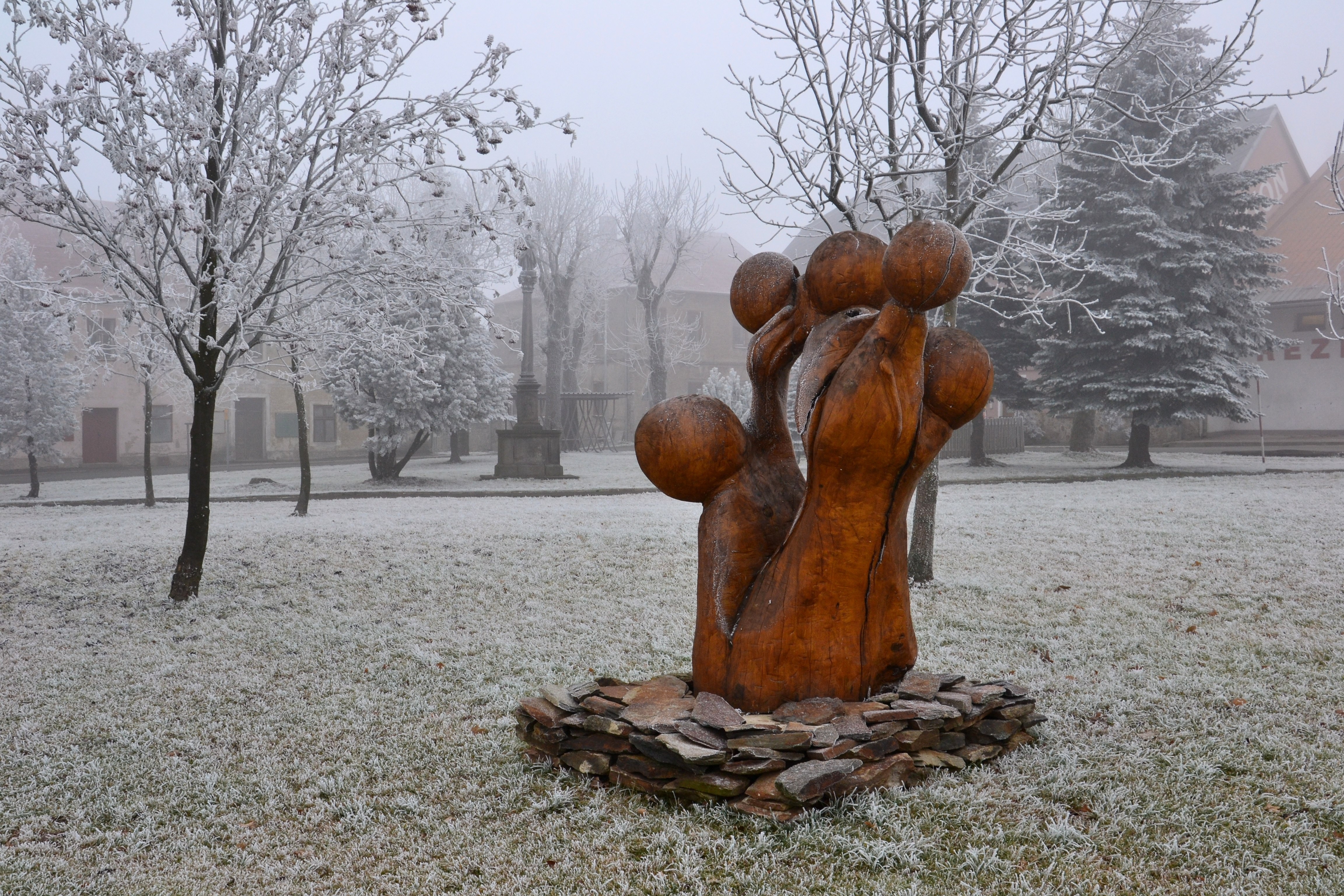 Moderní plastika na náměstí